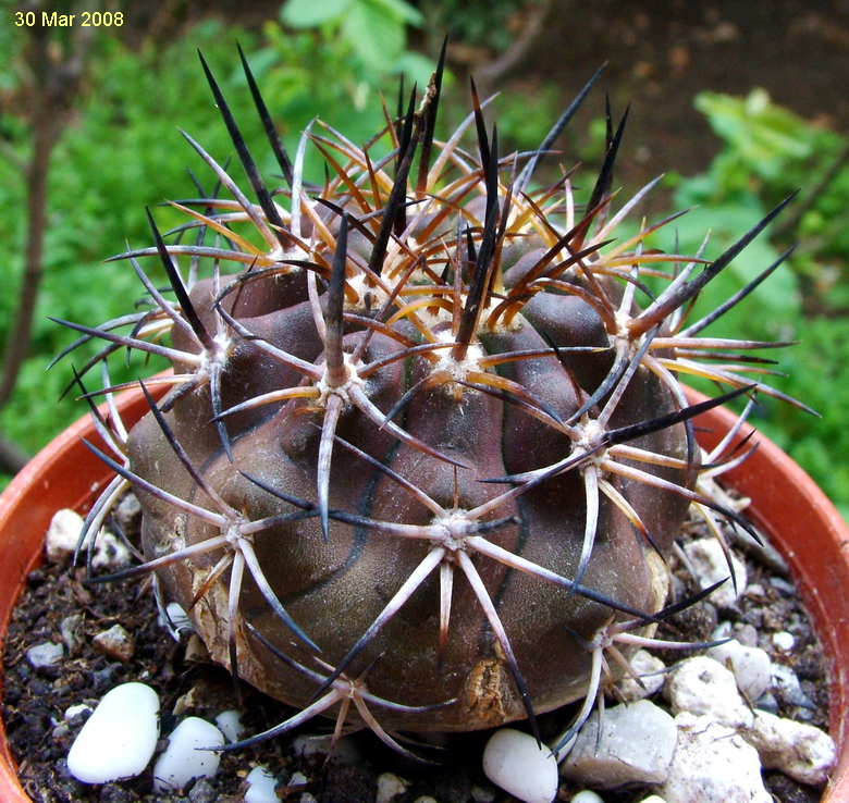 Copiapoa echinoides cv "dura" Chile-Atacama desert, Huasco to Totoral.